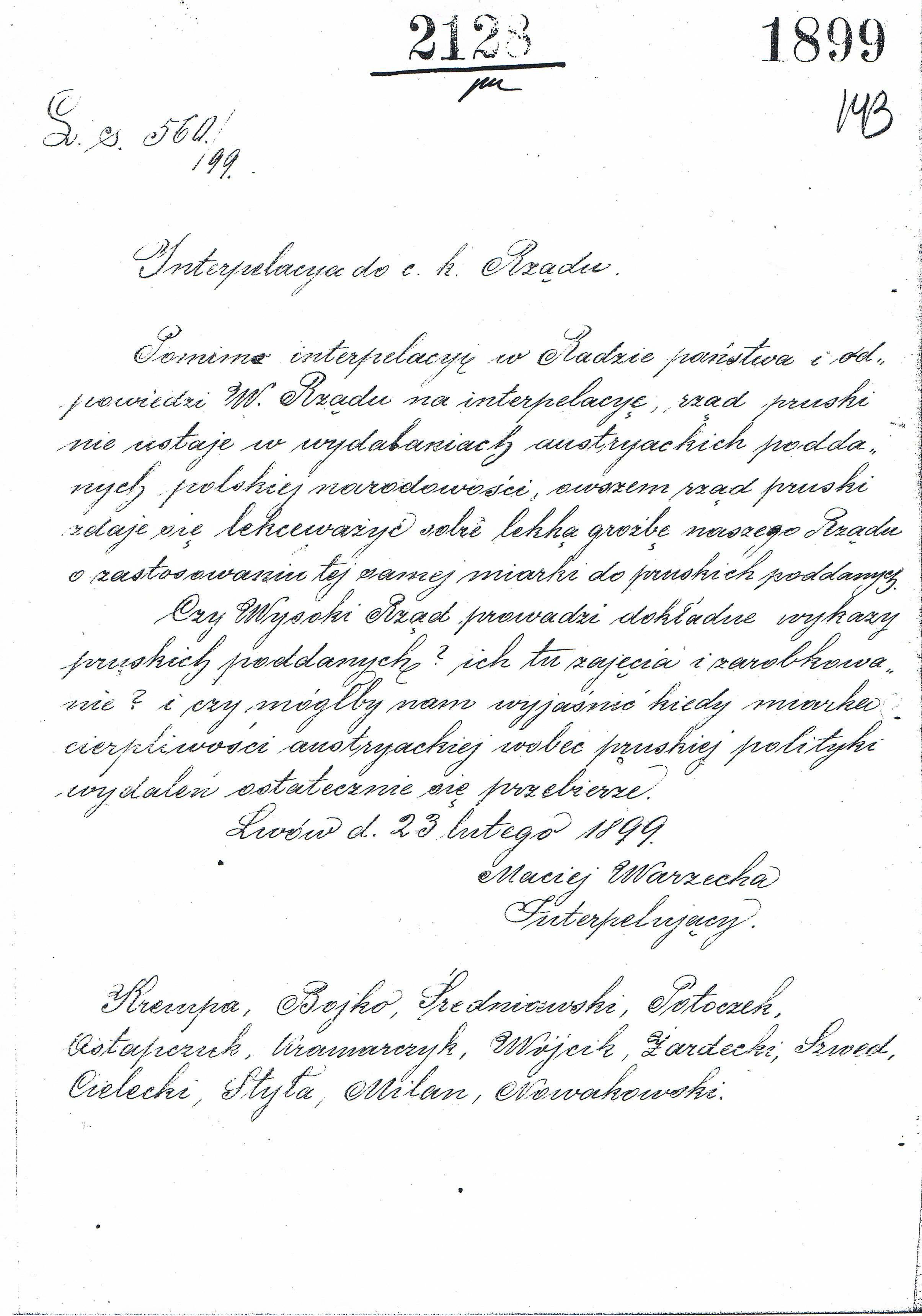 Skan interpelacji posła Macieja Warzechy